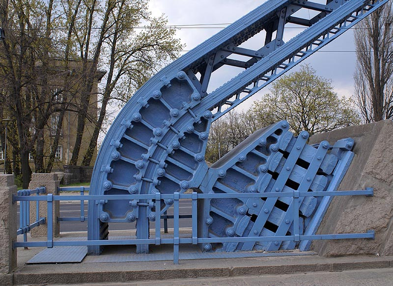 Wrocław, Most Grunwaldzki, 1907